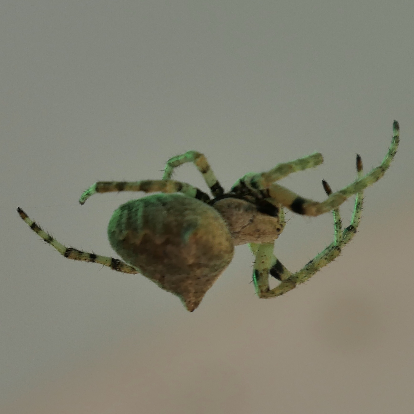 Gibbaranea gibbosa Hungary